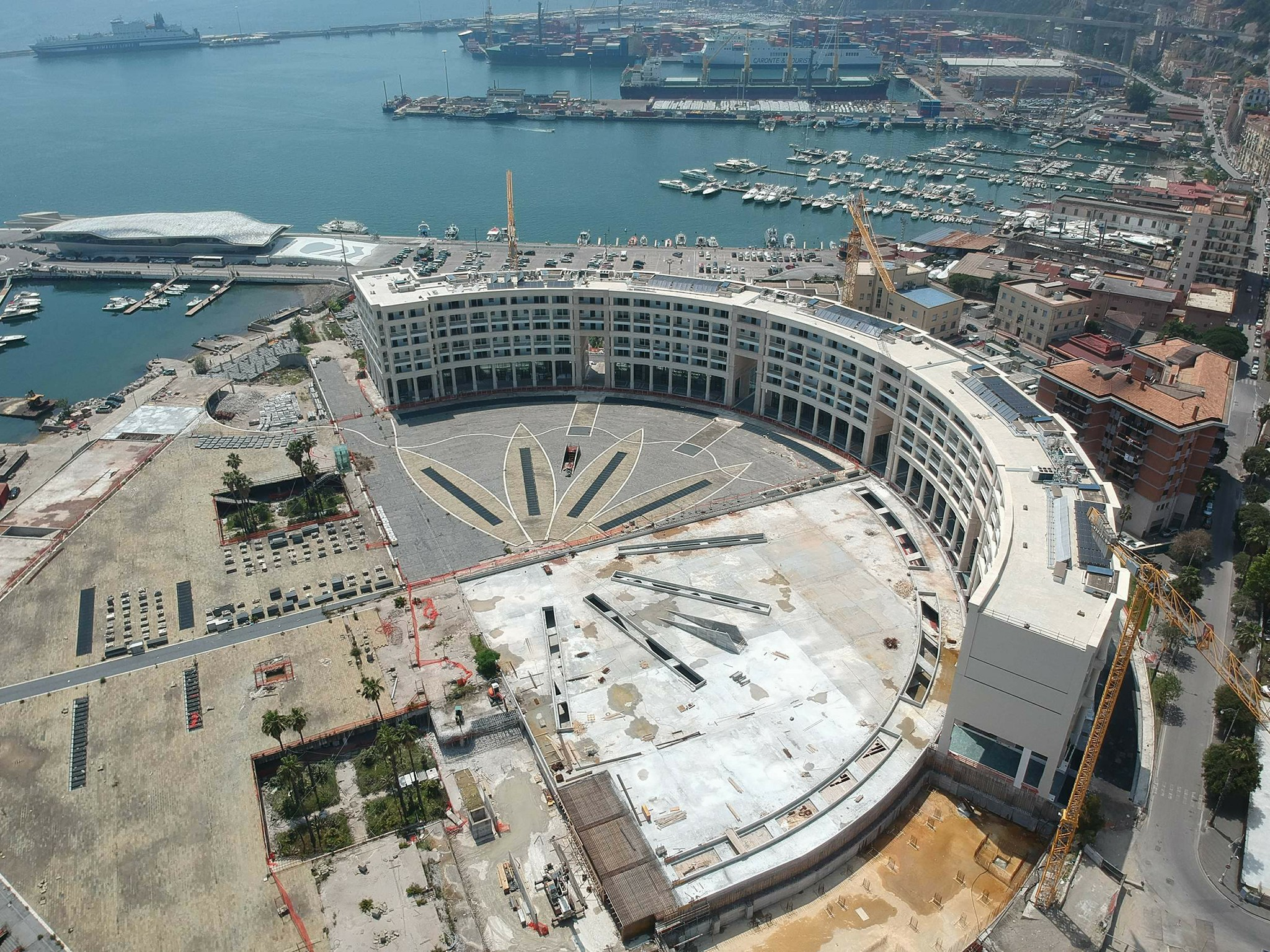 Piazza della Libertà a Salerno, 2018